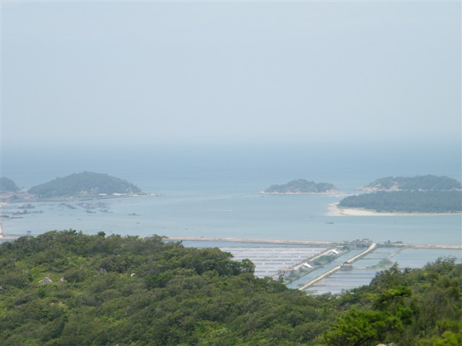 在大瞭望山南望濠江入海口。2009.8.5